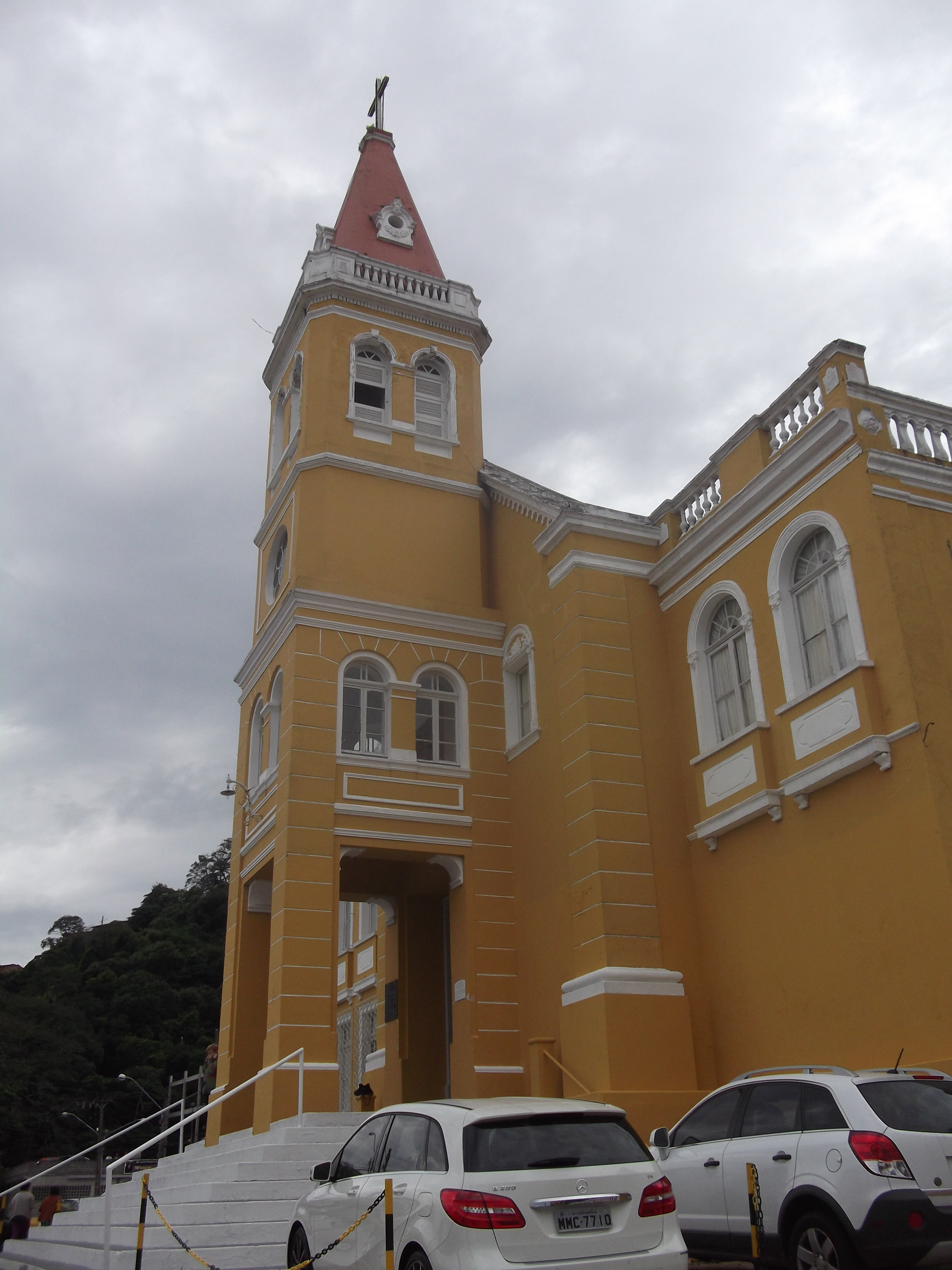 Capela do Menino Deus, Imperial Hospital de Caridade, Florianópolis, Brasil